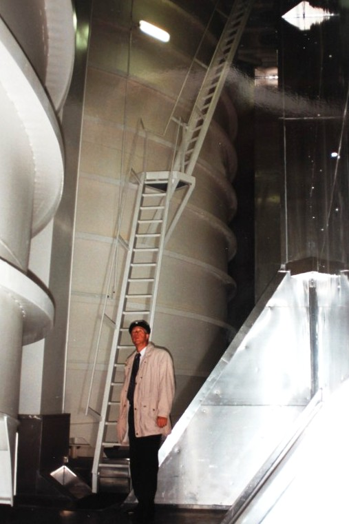 O-Saft-Tanks im Laderaum